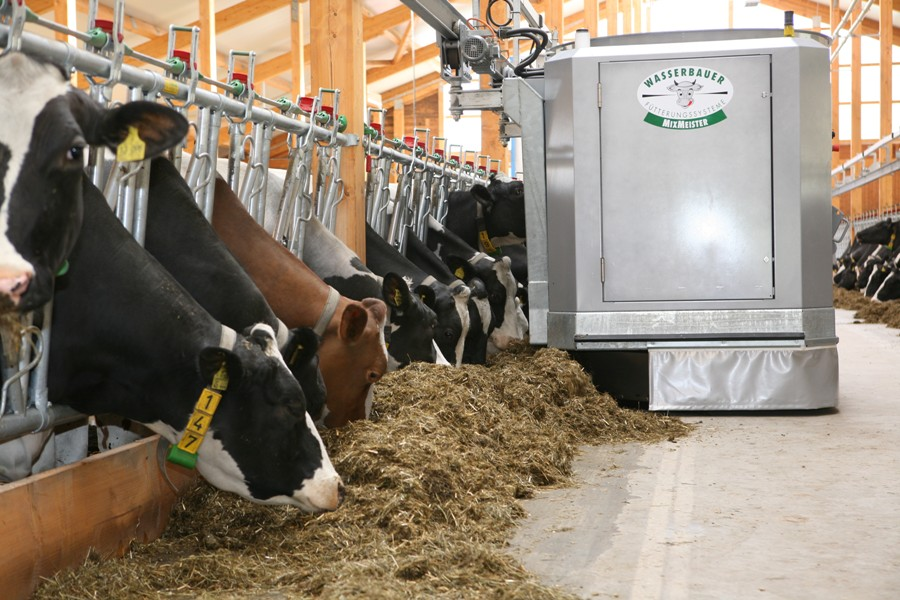 Fa. Wasserbauer MixMeister3000